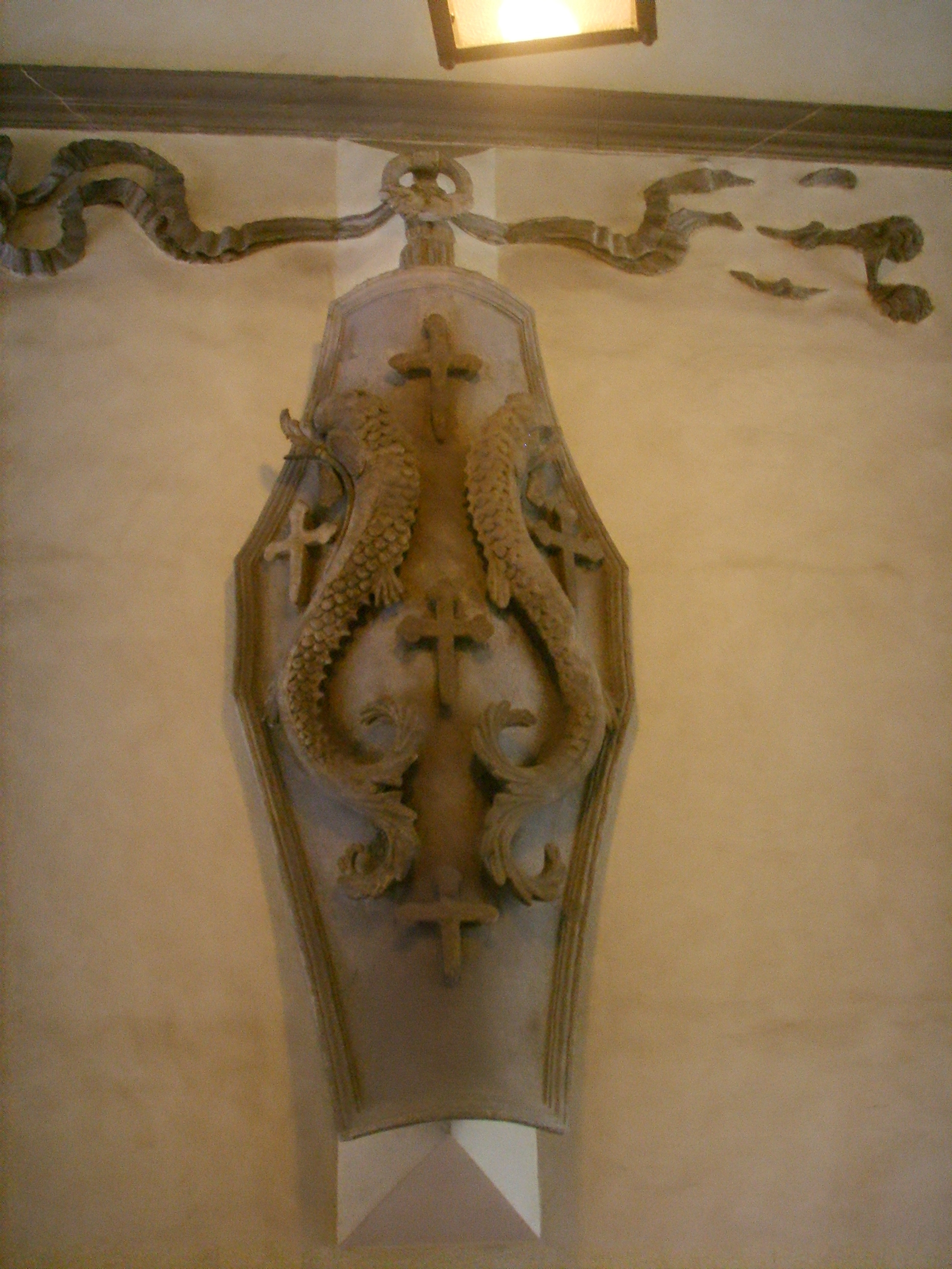 Palazzo de' Pazzi Coat of Arms, given to Donatello Florence, Italy